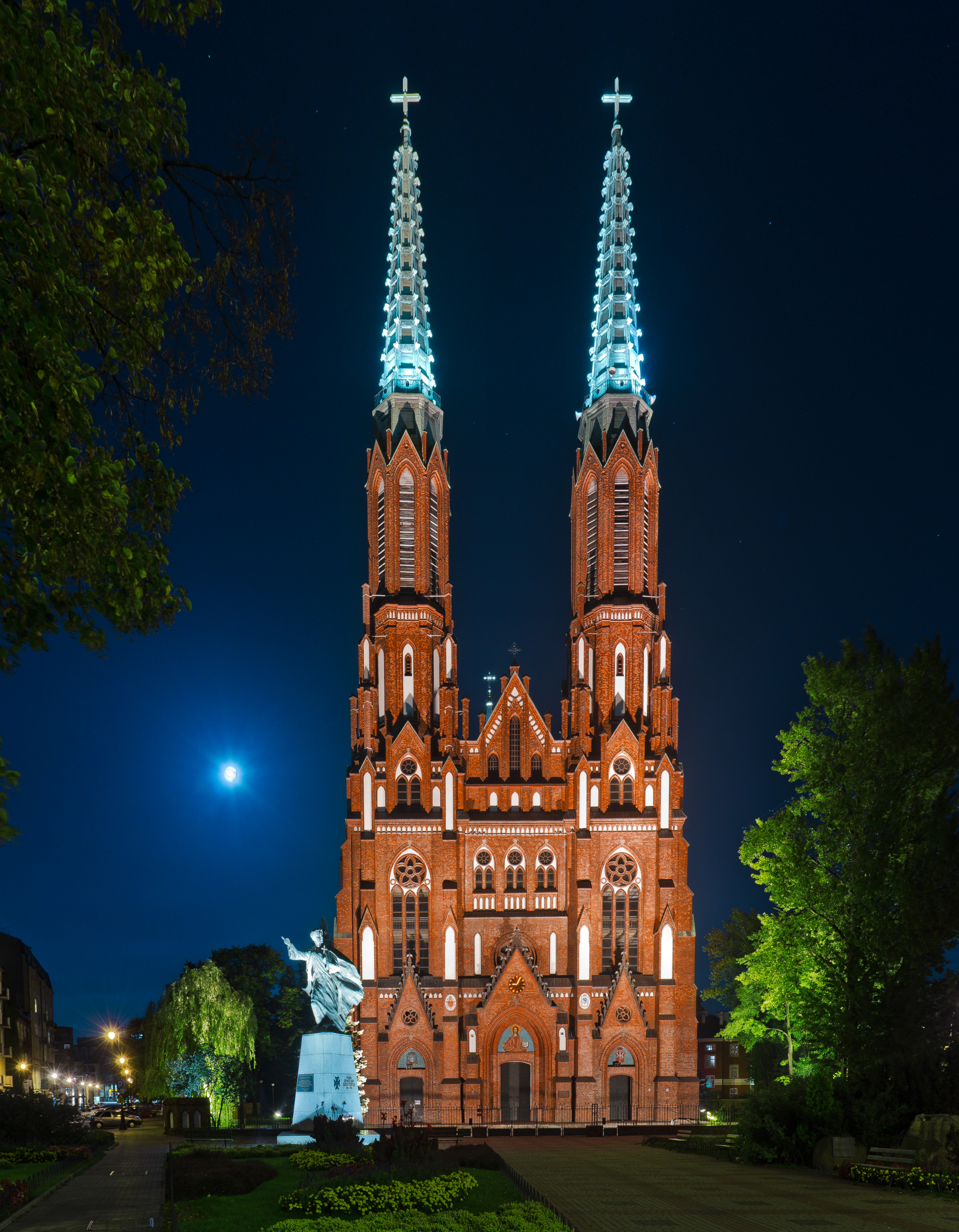 kościół pw. św. Floriana, 1889-1900, Nr 802 A